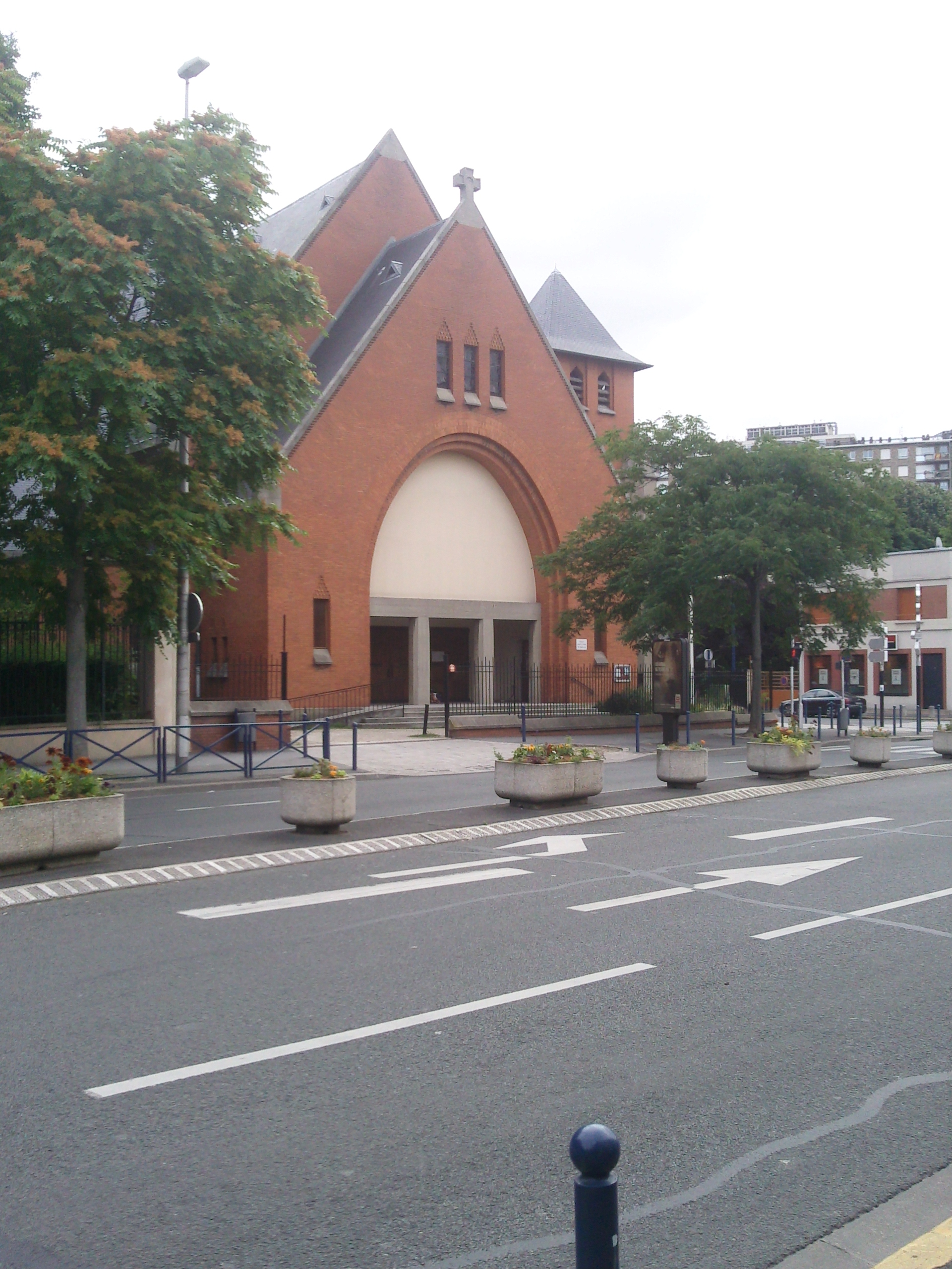 Eglise Sainte Louise de Marillac à Drancy